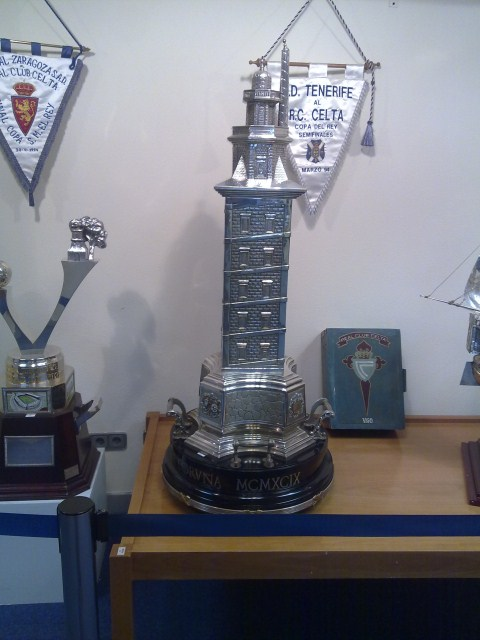 teresaherrera_celta